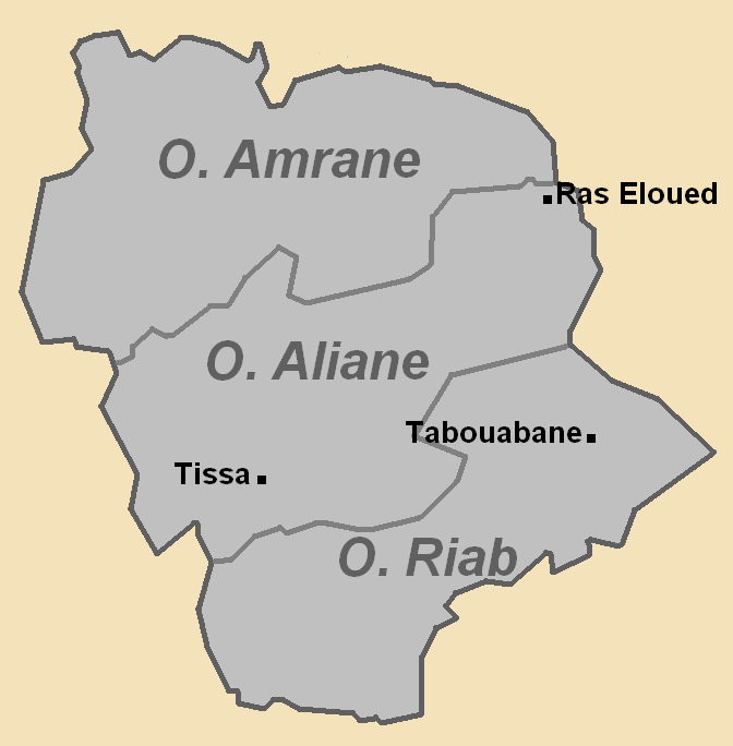 Les tribus Hyayna, selon Mohamed El Moubaraki, « Marocains du Nord: entre la mémoire et le projet » [1], L'Harmattan 1989 (ISBN:9782738400505), p.25